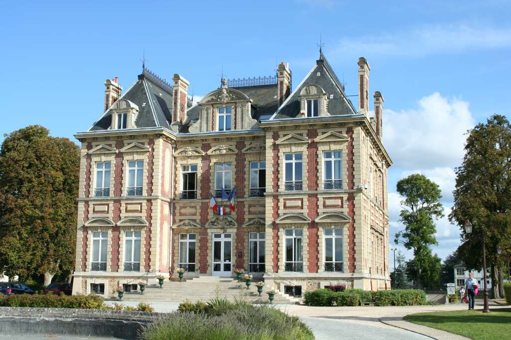 Mairie d'Ecquevilly - Yvelines (France)